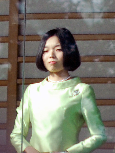 新年一般参賀における、彬子女王(Princess Akiko)